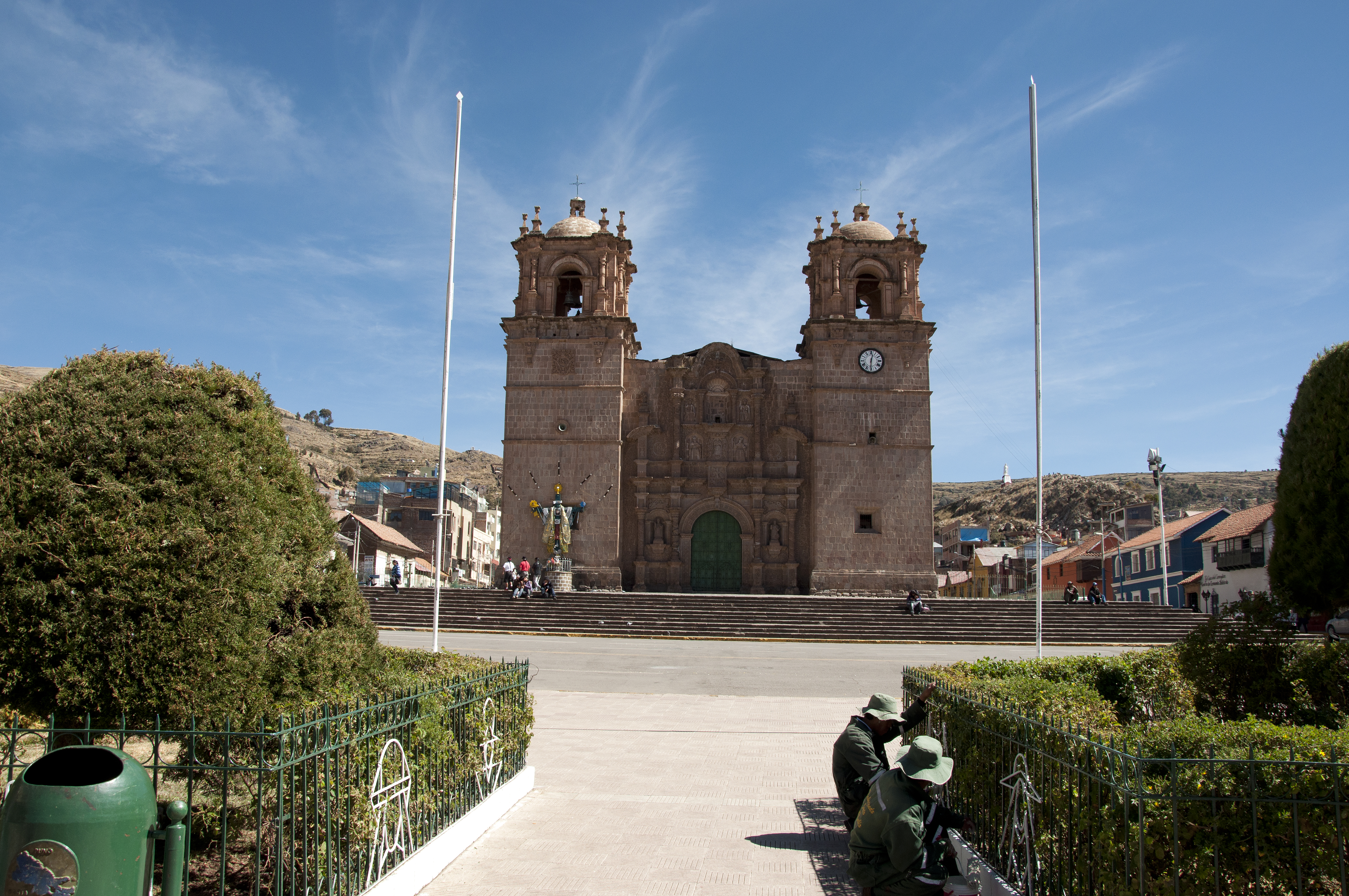 Basilica menor de Puno